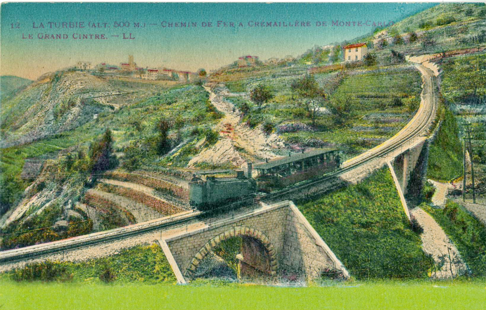 Carte postale ancienne éditée par LL, n°12 : LA TURBIE - Chemin de fer à crémaillère de Monte-Carlo - Le Grand Cintre